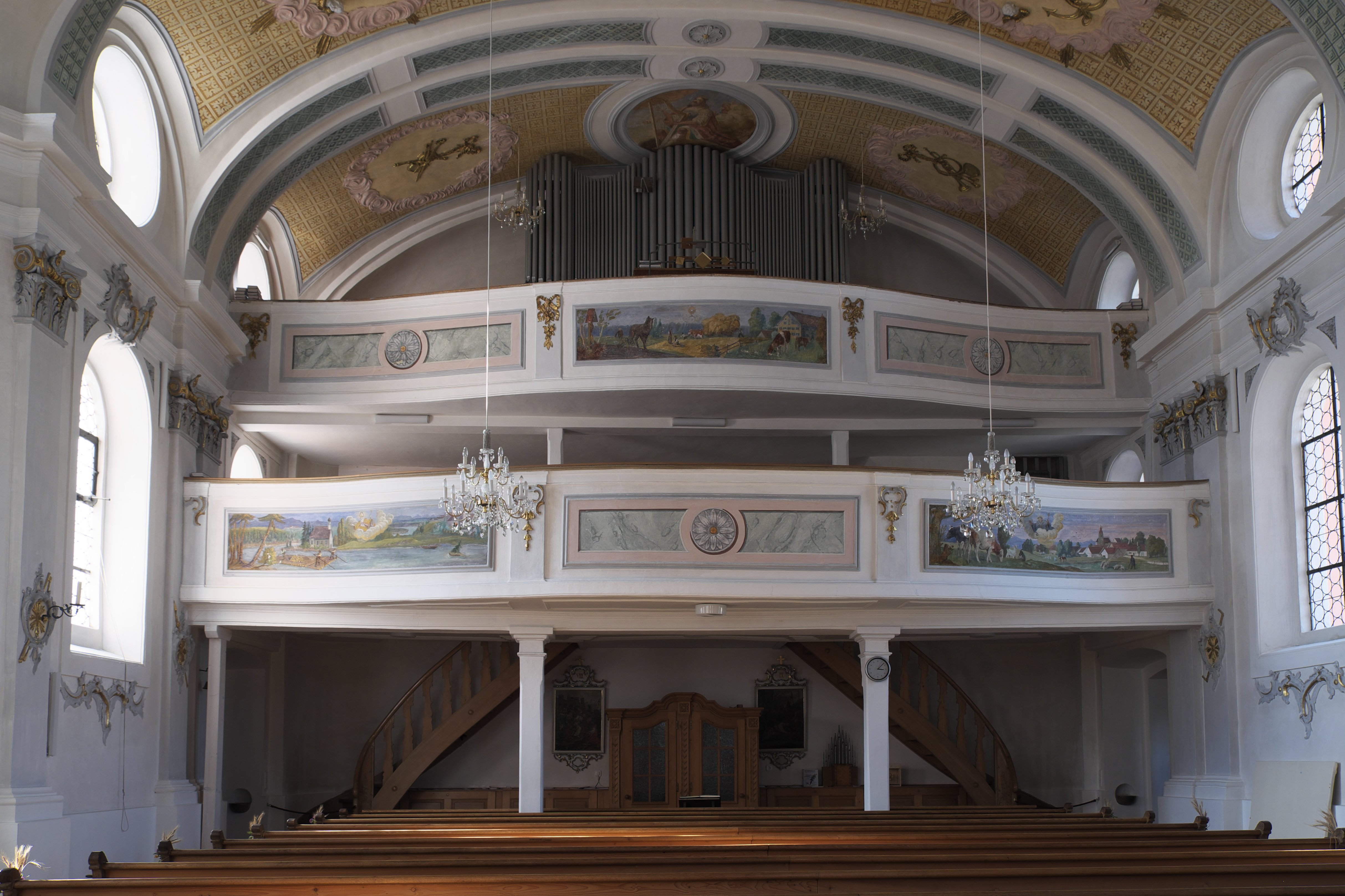 Katholische Pfarrkirche St. Nikolaus in Reichling im Landkreis Landsberg am Lech (Bayern/Deutschland), Emporenbilder von Jakob Huwyler, von 1924/25